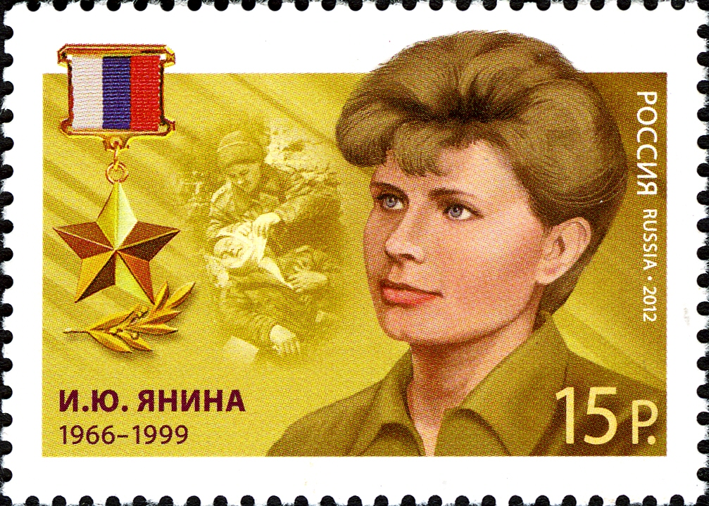 Почтовая марка России из серии "Герои Российской Федерации". 15,00 руб., 7 мая 2012 г. Каталог ИТЦ "Марка" № 1590. Ирина Юрьевна Янина ― медицинская сестра медицинской роты бригады оперативного назначения ВВ МВД России. За героизм, мужество и самопожертвование, проявленные при спасении раненых военнослужащих, посмертно присвоено звание Герой Российской Федерации